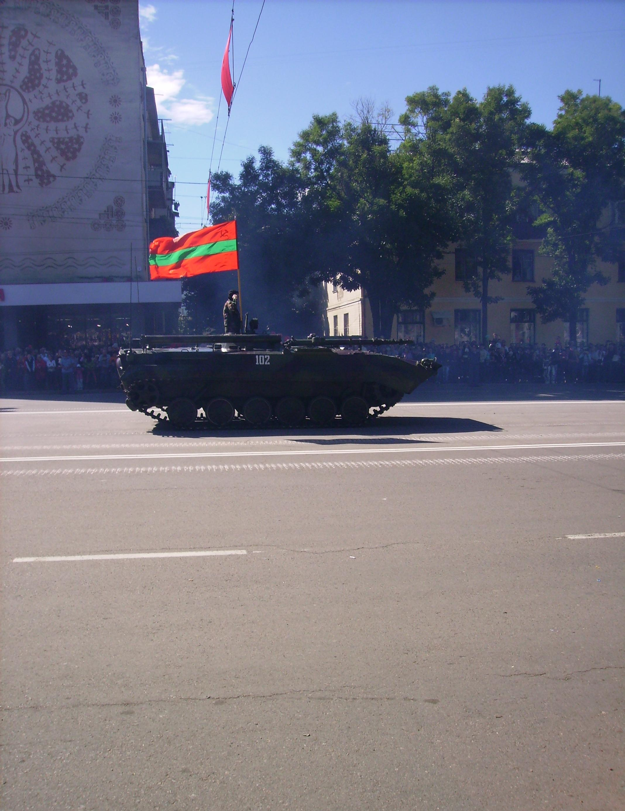 Военный парад на площади им. А.Суворова в честь 20-ти летия независимости ПМР. Так как 20-ть лет круглая дата, то в праде принимала участие военная техника (как и в параде в честь 15-ти летия независимости ПМР).